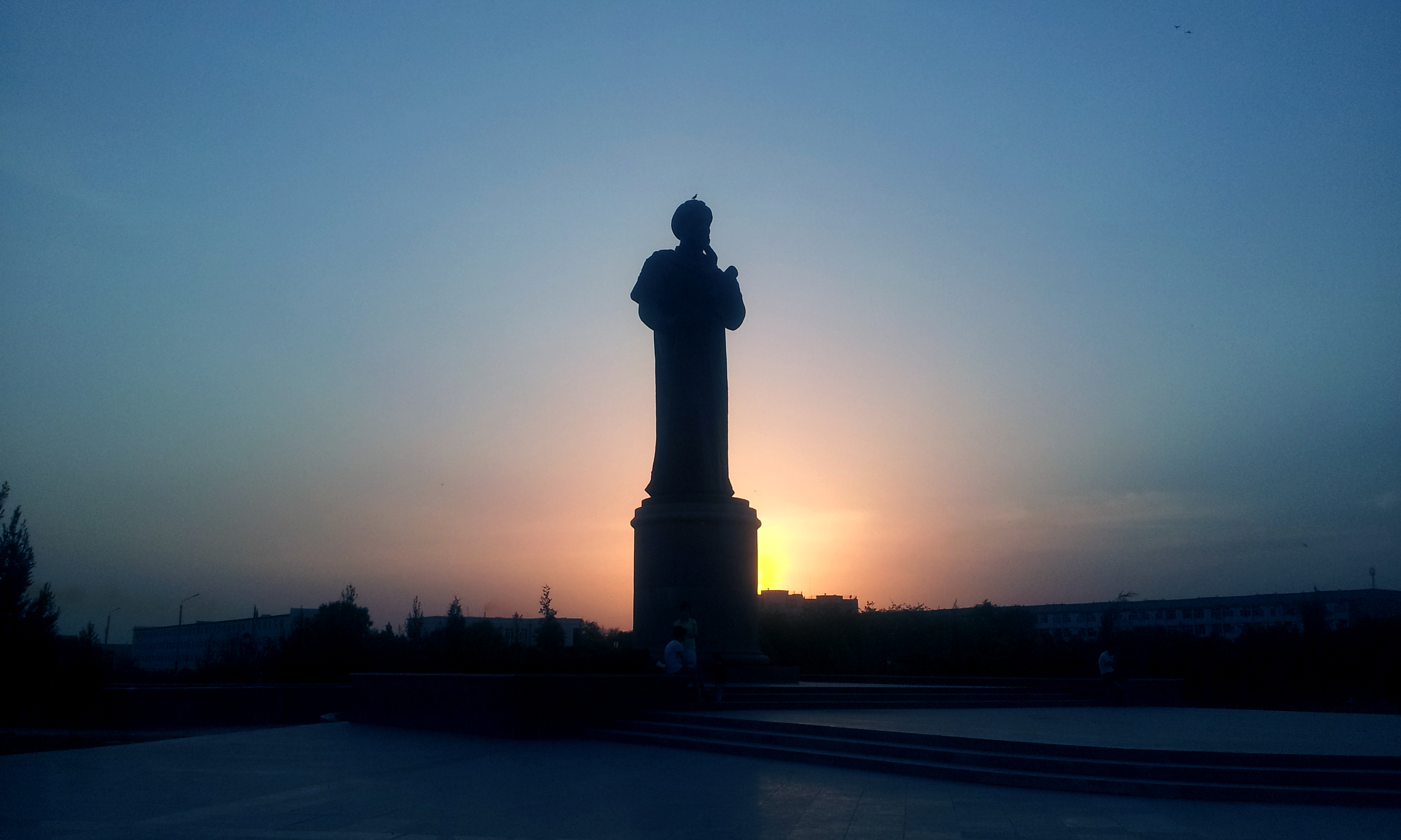 Oʻzbekcha/ўзбекча: Alisher Navoiy haykali. Navoiy shahri.